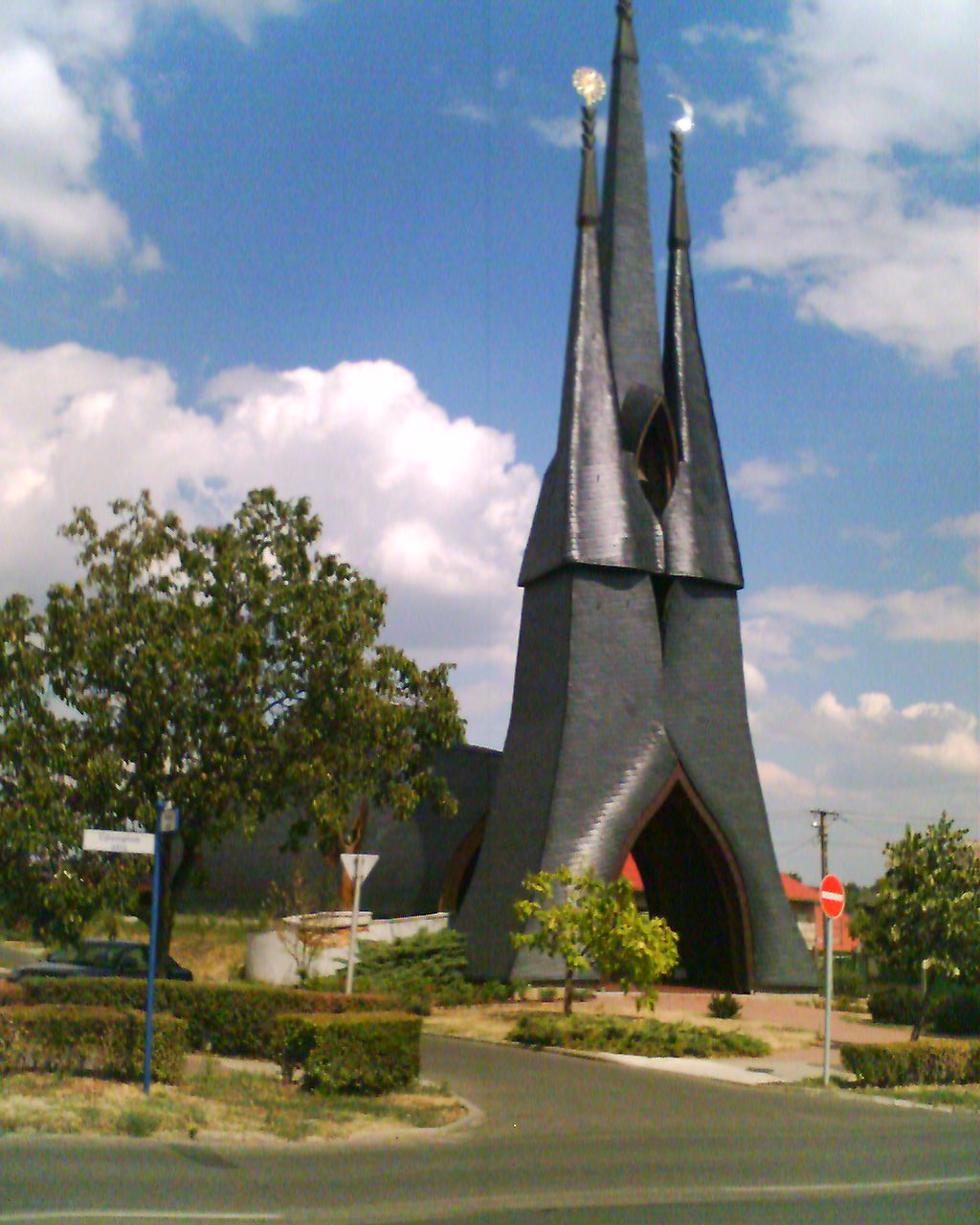 Imre Makovecz @PAKs